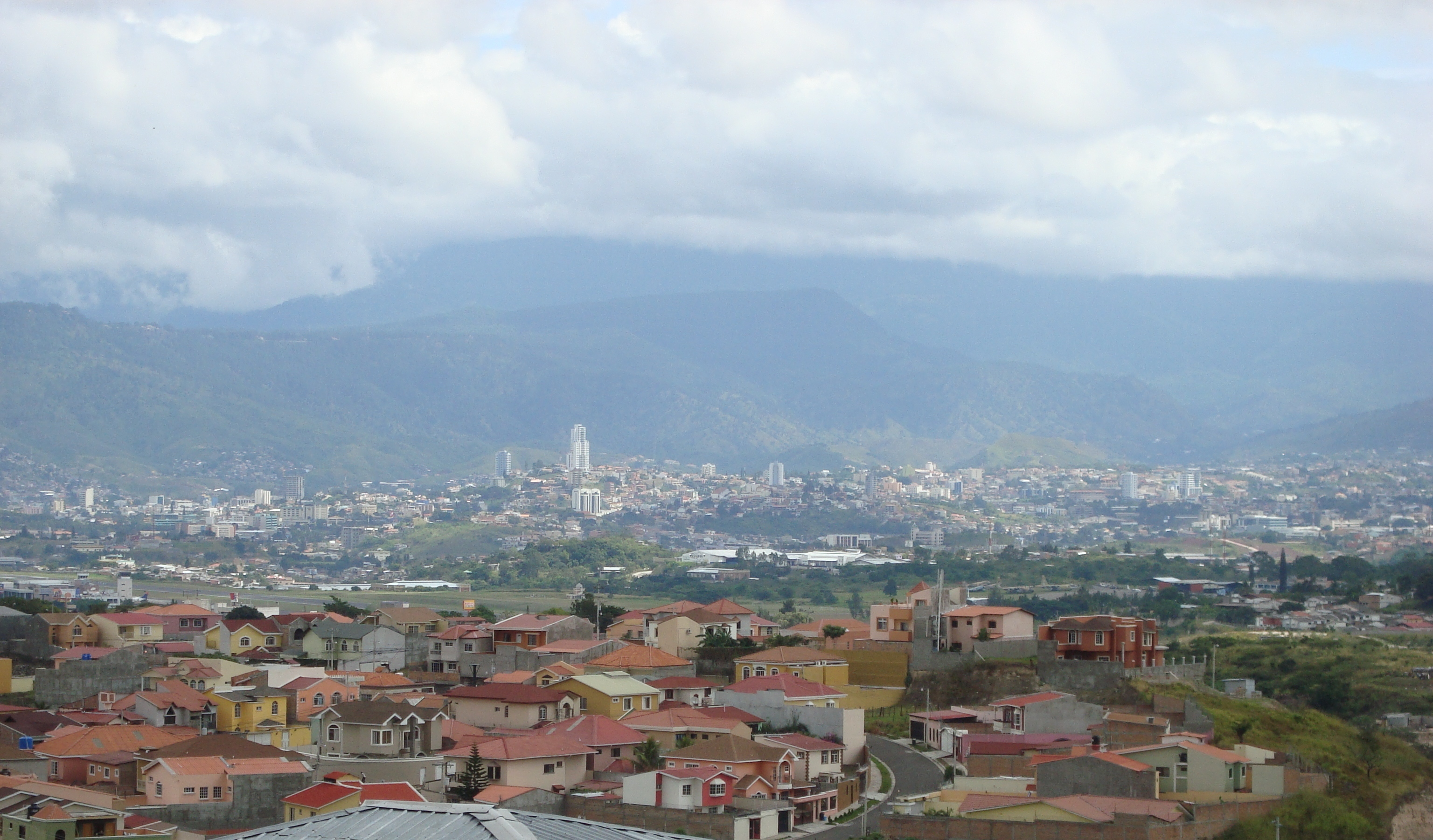 Vista desde Las Uvas